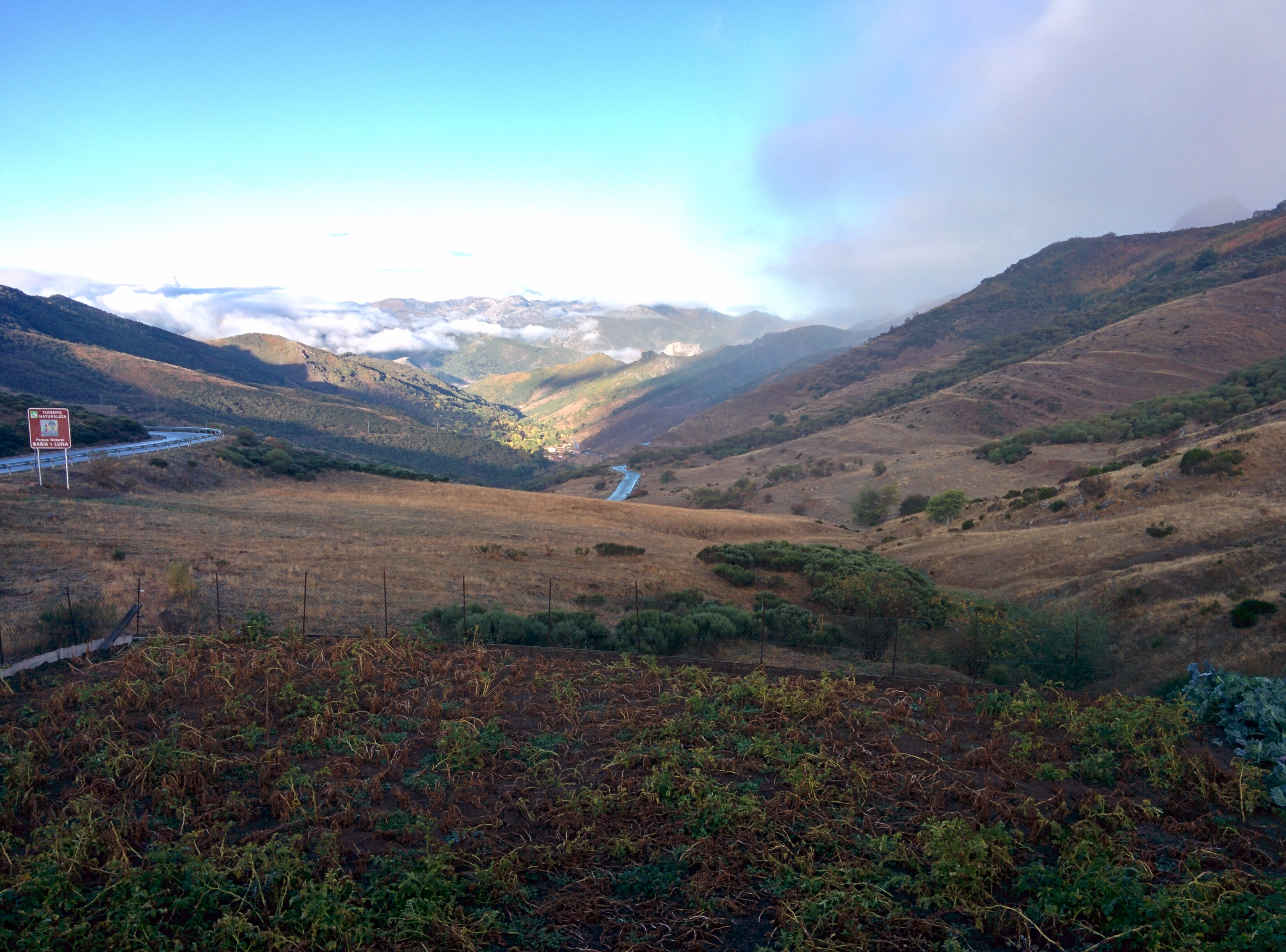 Vista hacia el oeste desde el puerto de Aralla, en León (España).